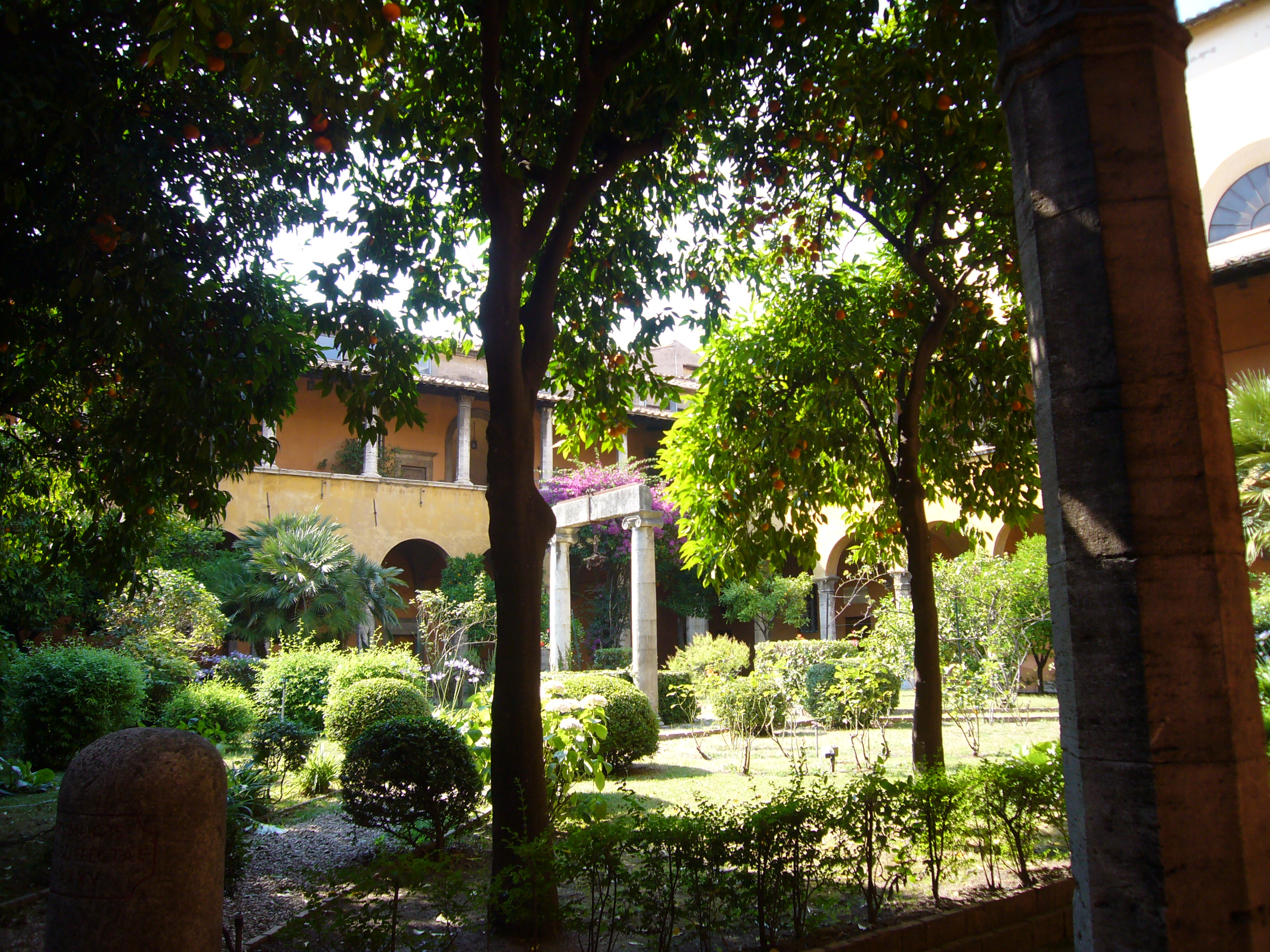 Roma, san Giovanni Battista dei Genovesi - chiostro di Baccio Pontelli